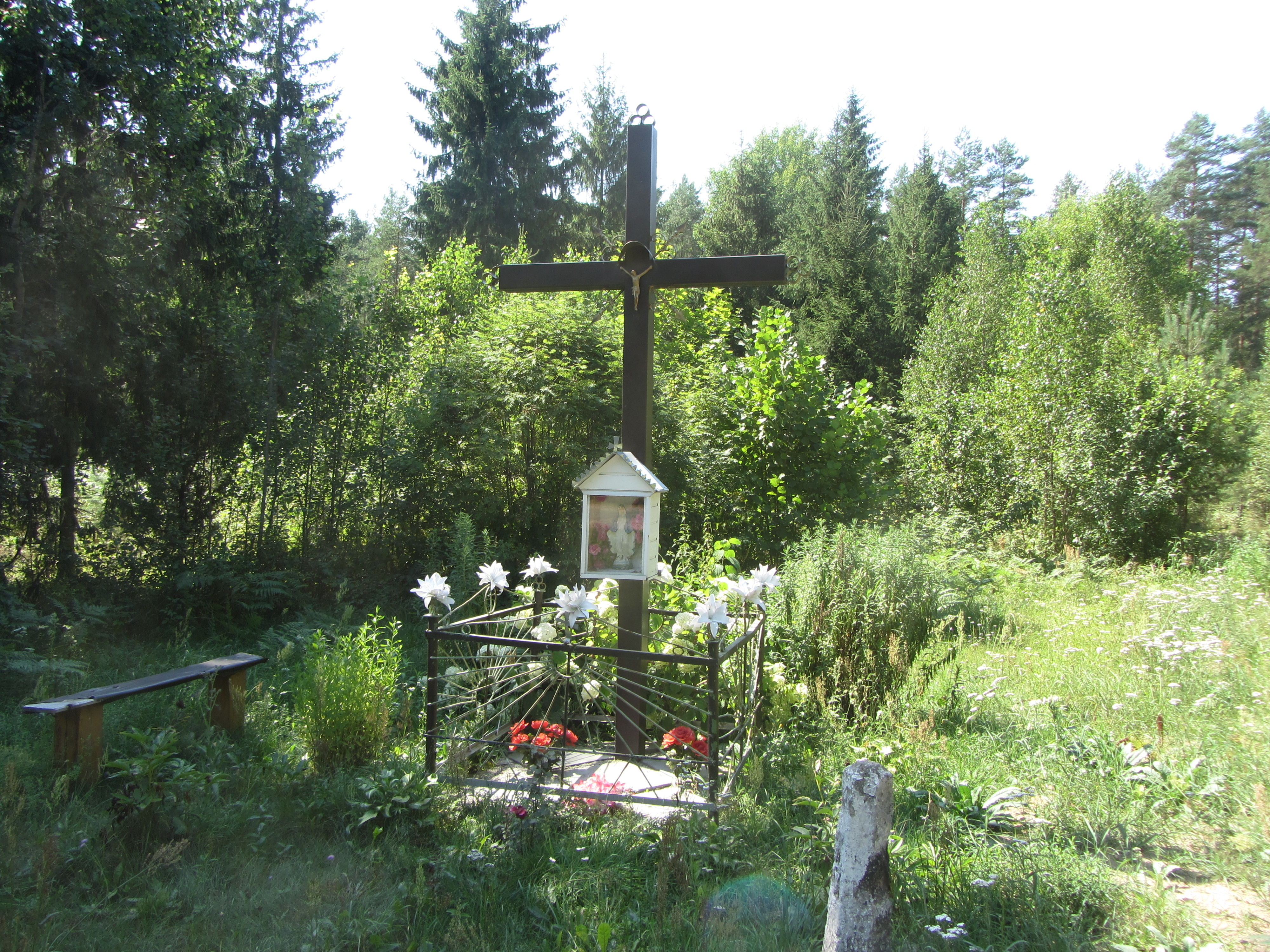 Gerviškių sen., Lithuania